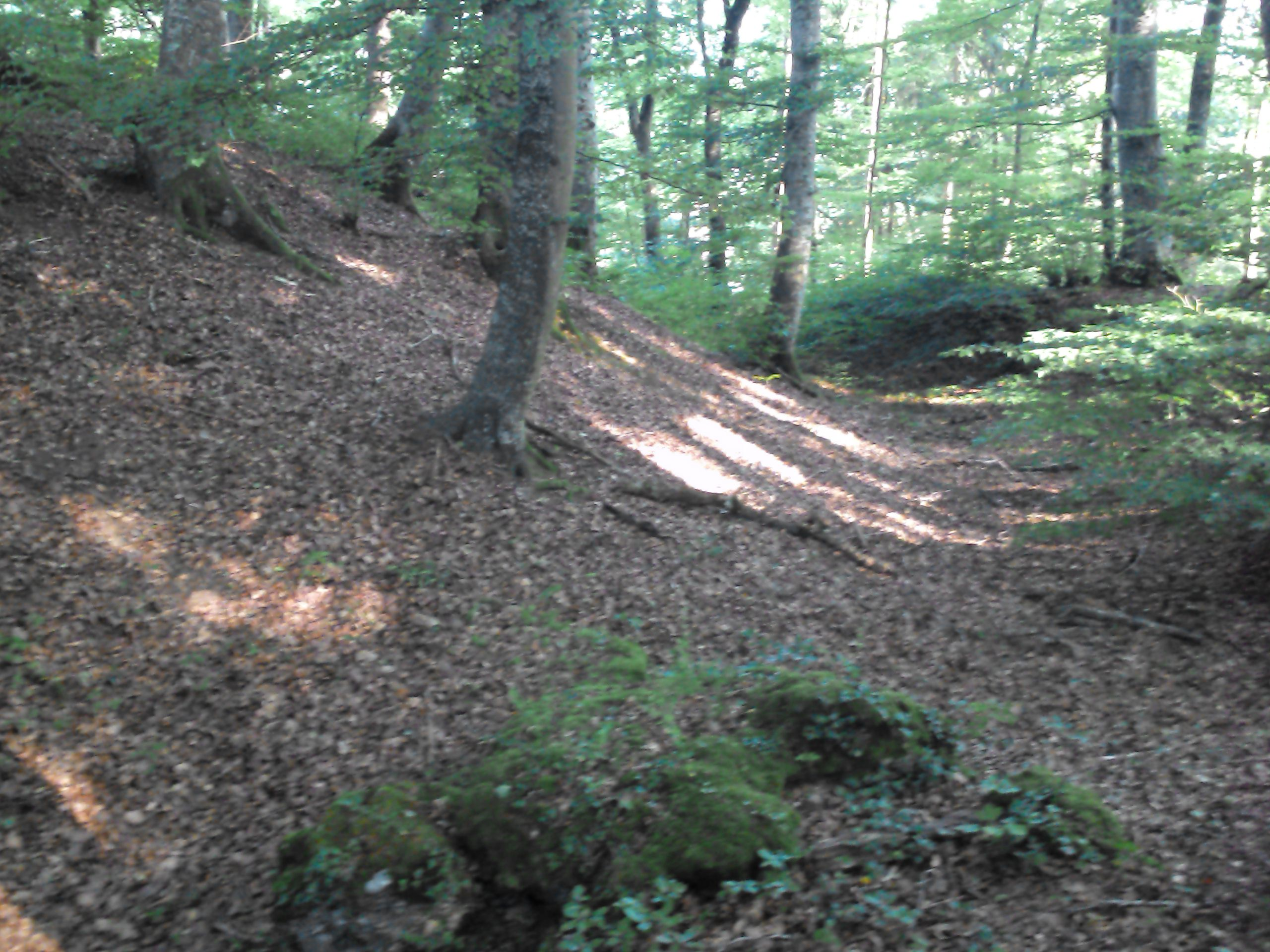 Semberg bei Schwerzen, Gemeinde Wutöschingen, Ringwallburg, Wall und Graben der Gipfelbefestigung.